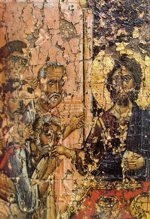 ПРИЧЕСТУВАЊЕ НА АПОСТОЛИТЕ